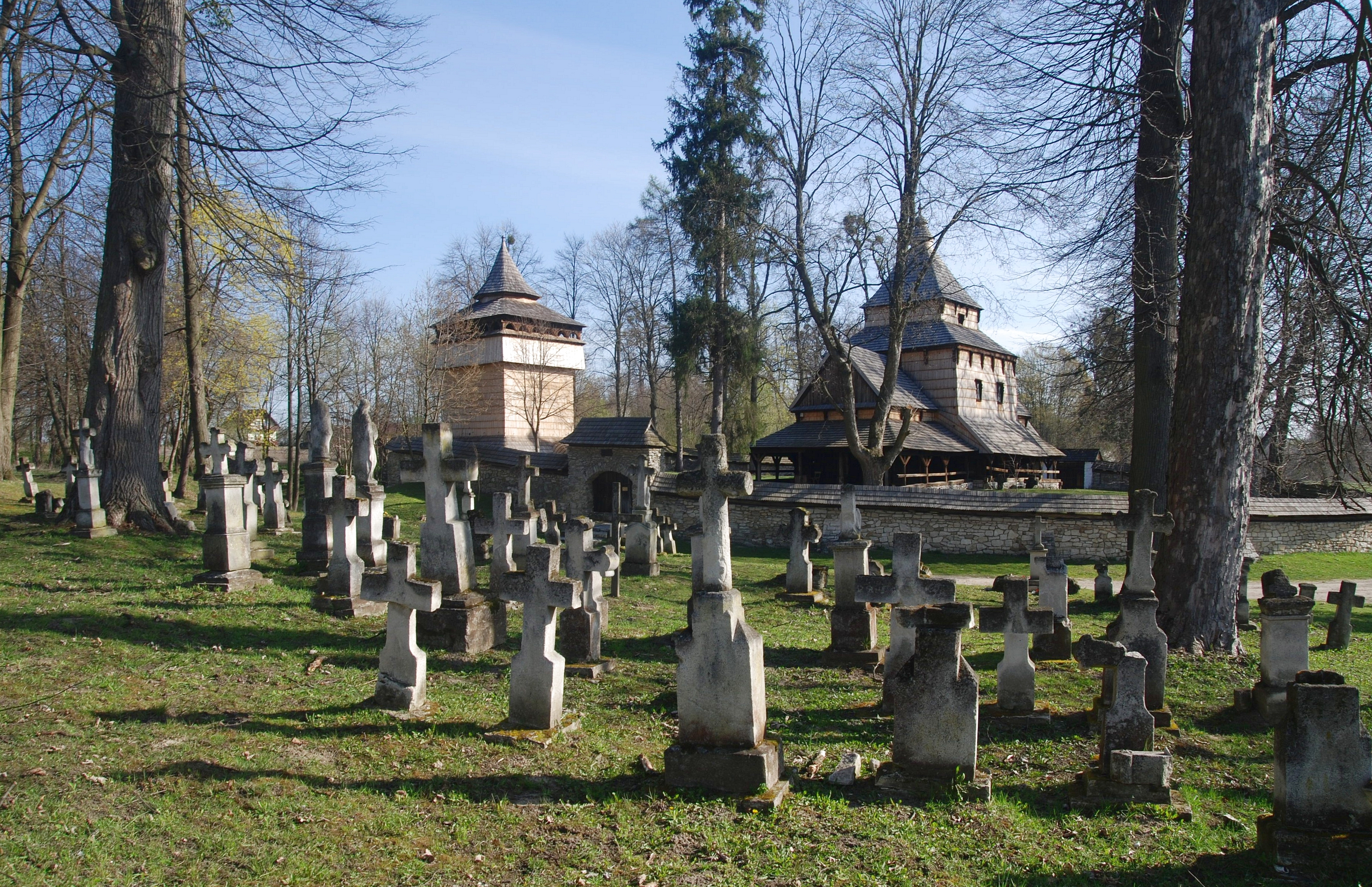 wieś Radruż